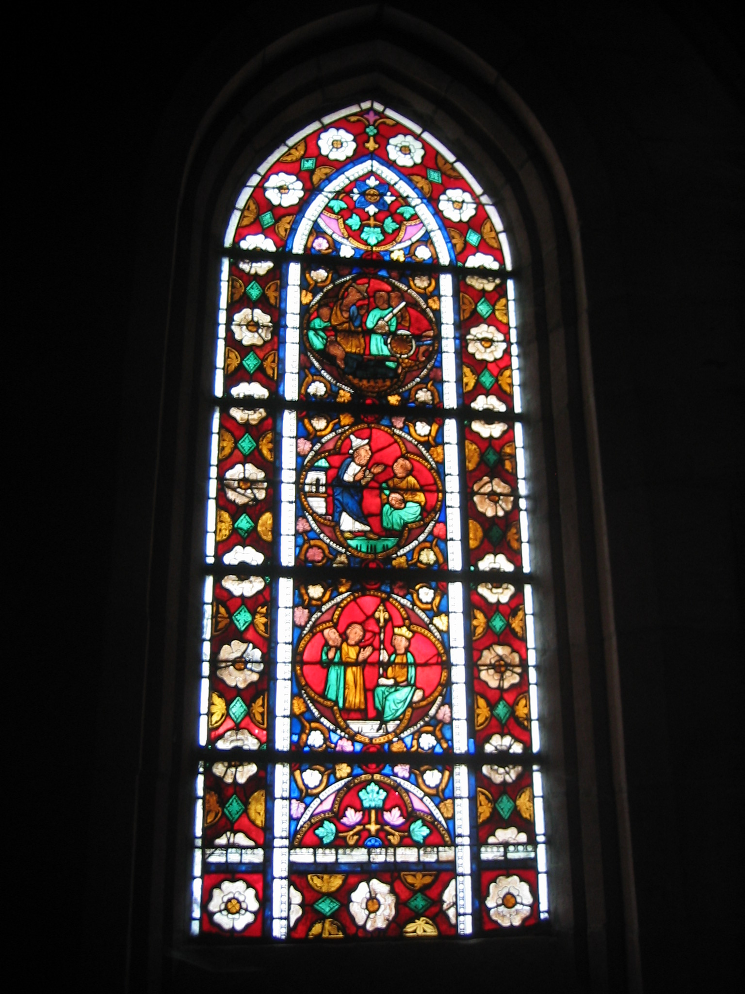 Cathédrale de Saint-Dié-des-Vosges, deuxième chapelle latérale nord : vitrail gauche 13ème siècle (1285-1290).